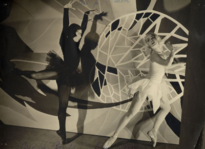 Maj-Lis Rajala ja Doris Laine baletissa Pessi ja Illusia 1952